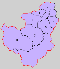 兵庫県朝来郡の町村制時点の町村。